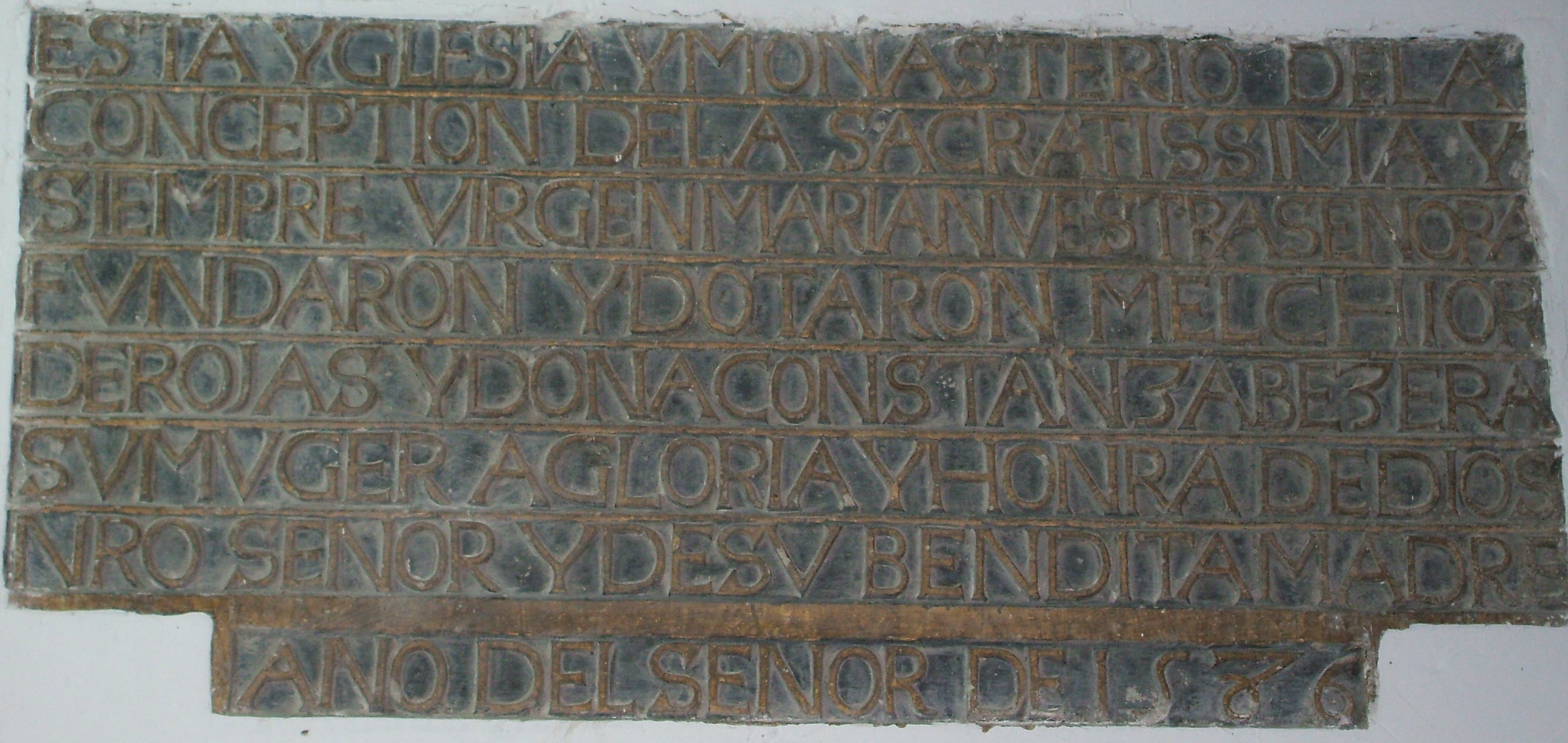 Detalle de la piedra fundacional de la iglesia conventual de la Concepción, de Cuéllar